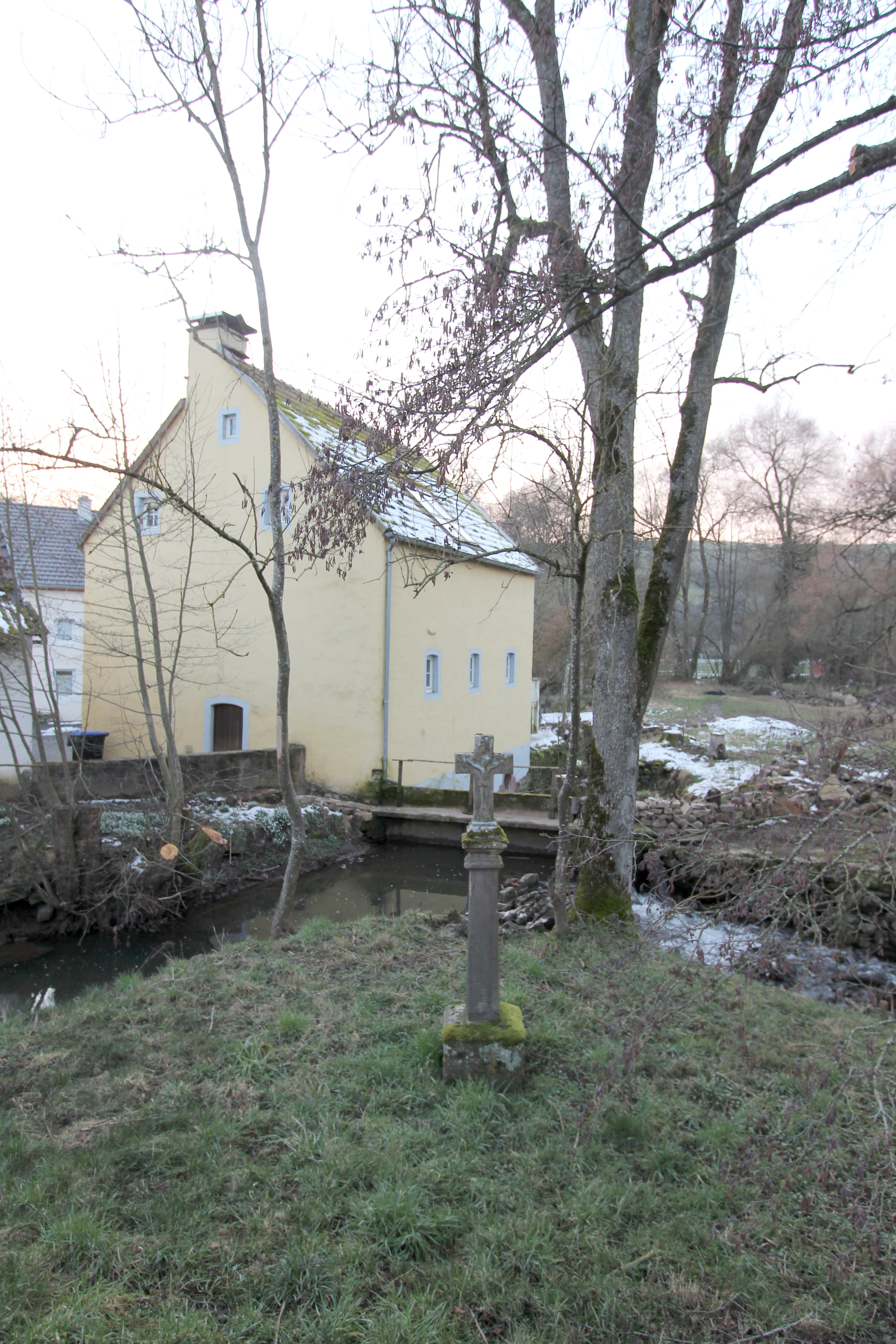 54634 Bitburg-Stahl, Oberweiser Straße, zu Nr. 28. Mühle; Putzbau, bezeichnet 1798; Gesamtanlage mit Brückenbogen und Ufereinfassung des Grabens. Aufnahme von 2018.